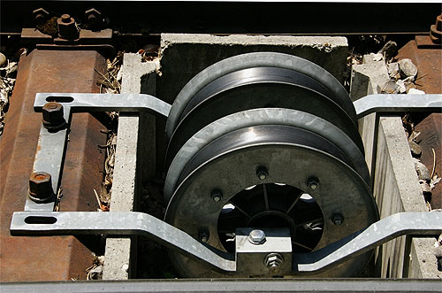 Biel: Umlaufrollen der Standseilbahn Biel-Magglingen